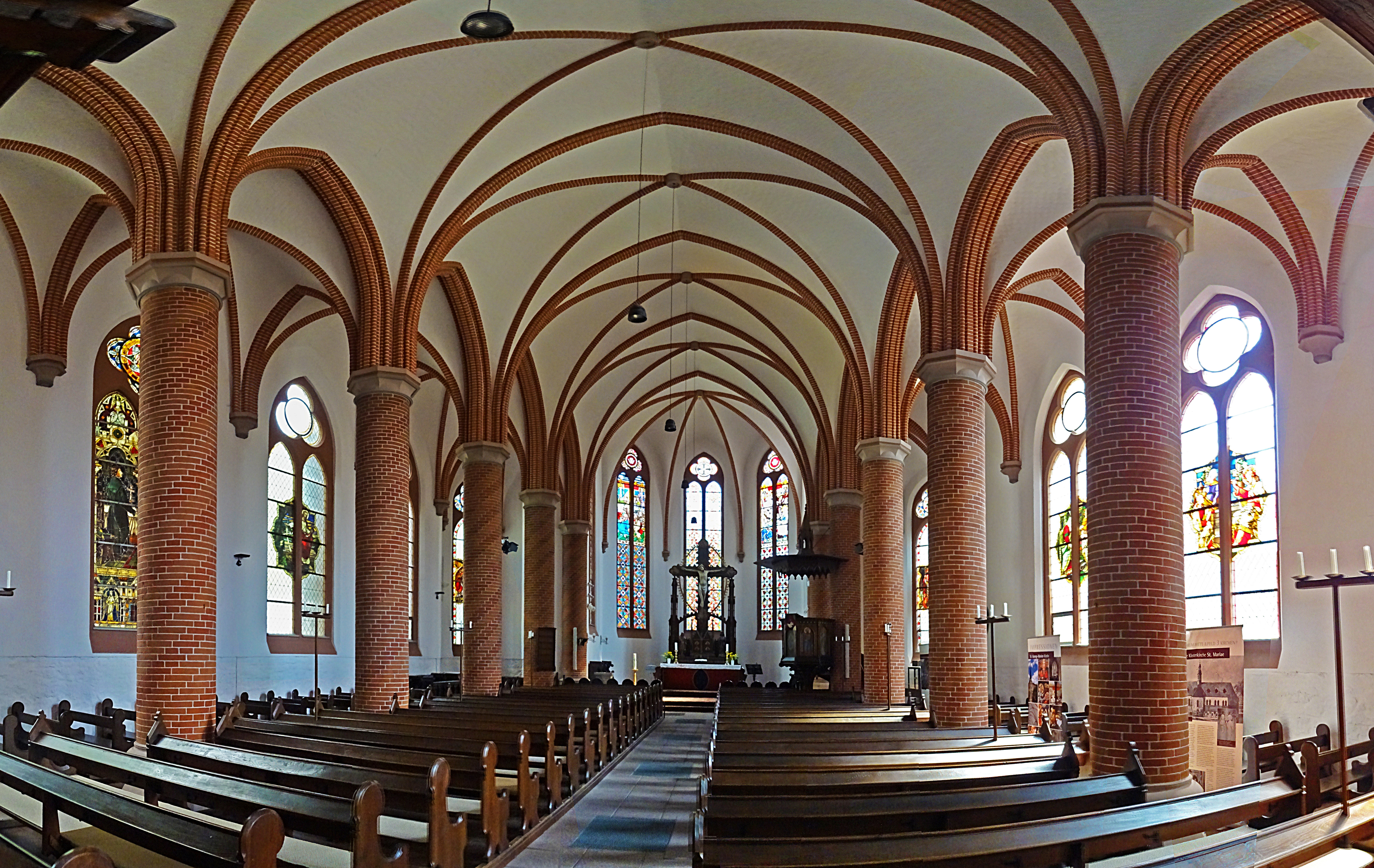 Innenraum Panorama der Stiftskirche St. Georg-Marien (Ilfeld)